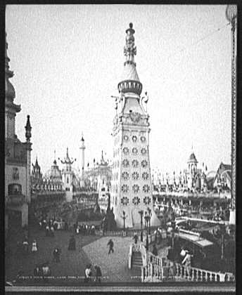 Electrotower („Elektroturm“) des Lunapark-Vergnügungsparks auf Coney Island, New York.